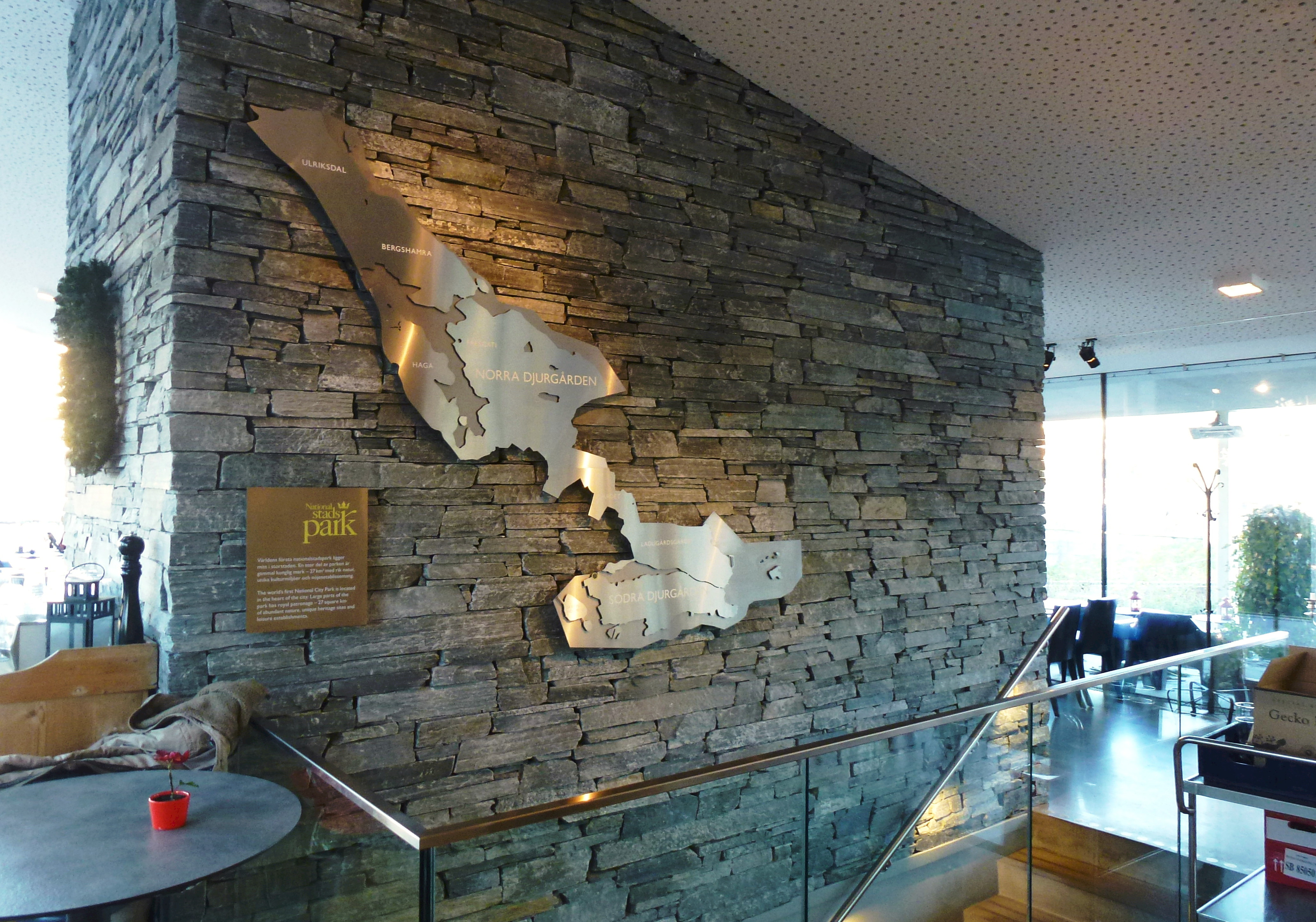 Djurgårdens besökscentrum, arkitekt Ettelva Arkitekter